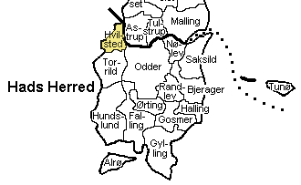 Kort der viser Hvilsted Sogn, Hads Herred, Århus Amt, Denmark.